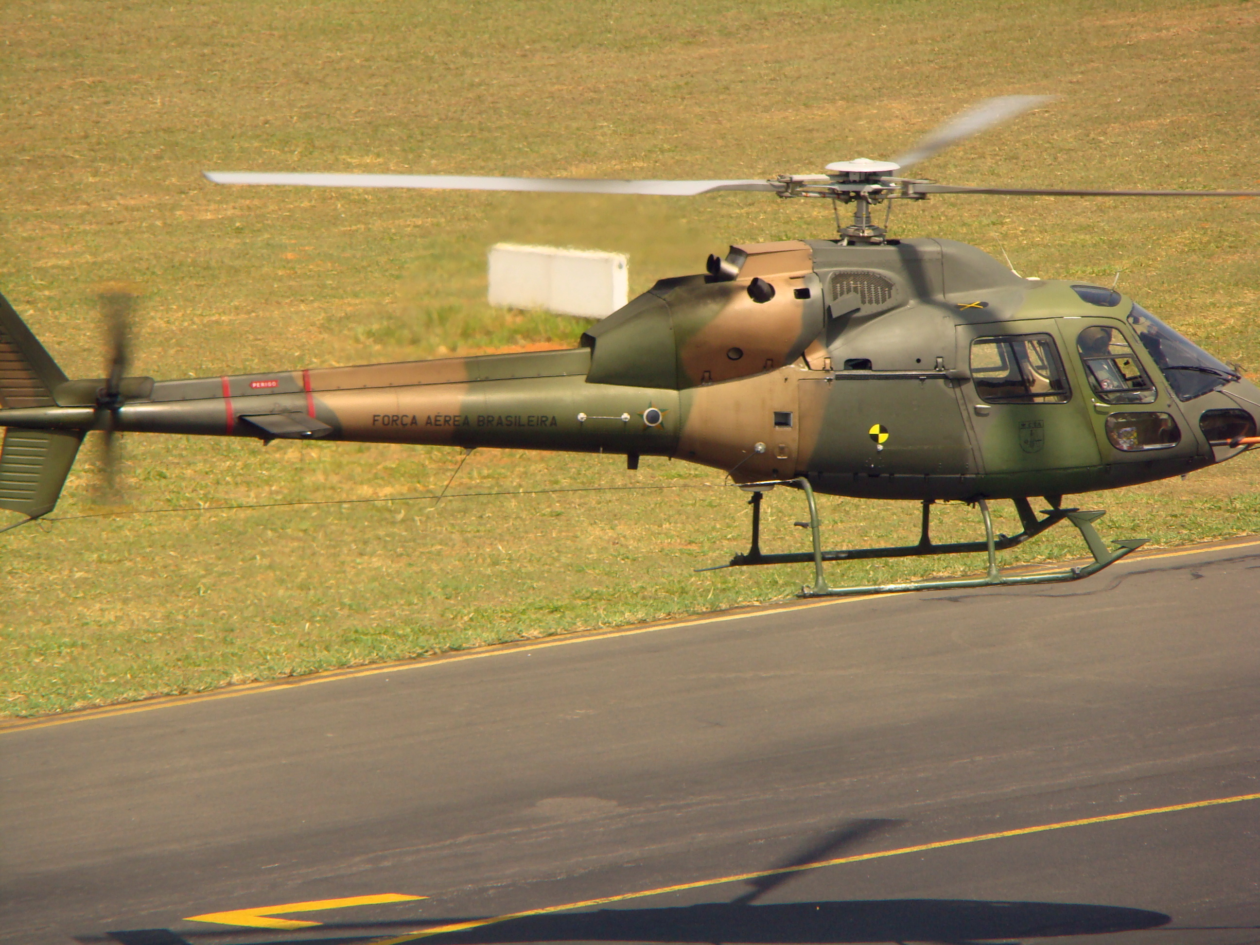 helicóptero da força aérea